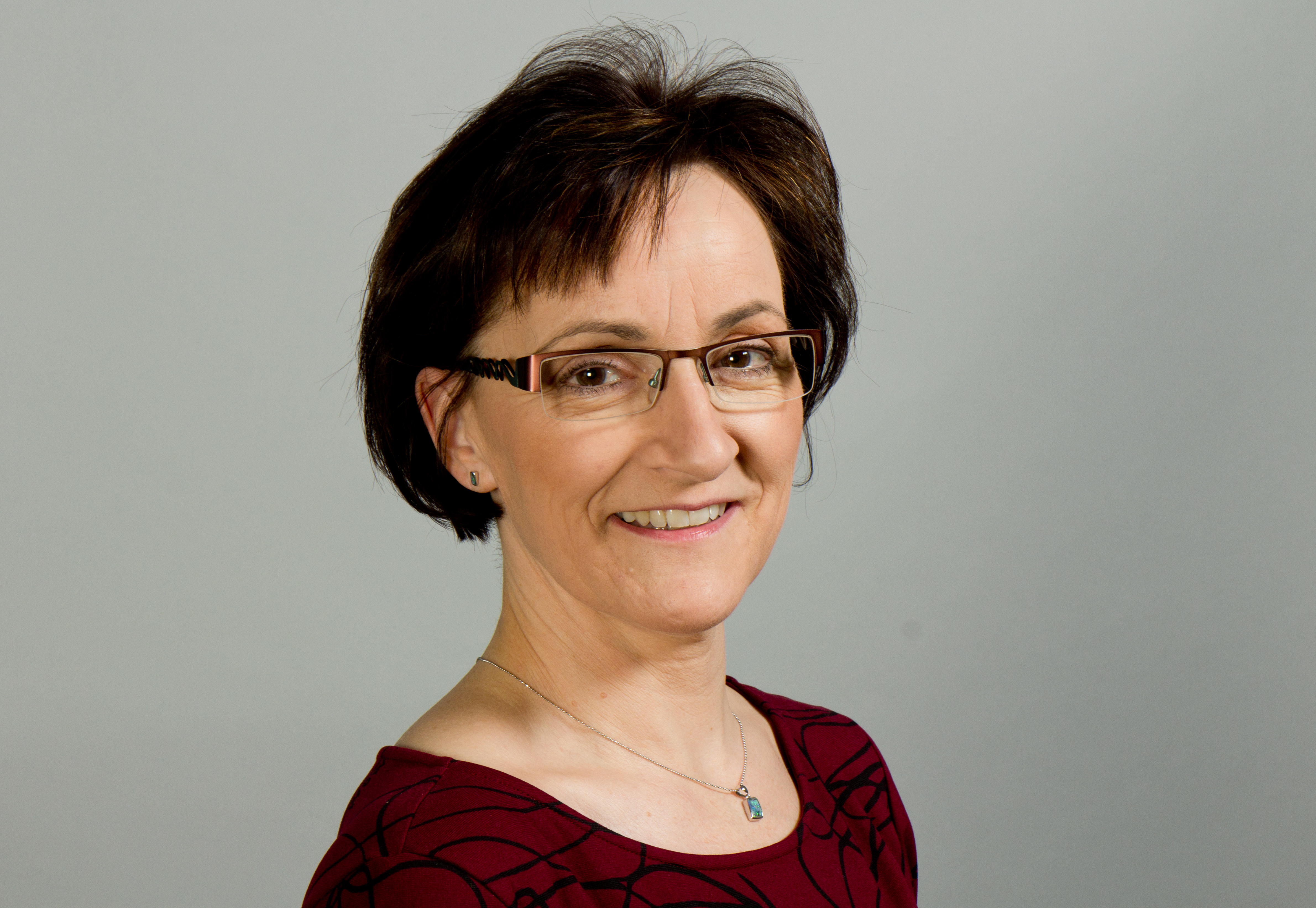 Karin Strempel geb. Schneider (* 27. August 1961 in Meißen) ist eine deutsche Politikerin (CDU). Sie ist seit 1990 Mitglied des Sächsischen Landtags. Wikipedia im Landtag – Sachsen 17. bis 18. Dezember 2013 in DresdenDieses Foto wurde im Rahmen des Projektes „Wikipedia im Landtag“ erstellt. Fragen zur Nachnutzung Wenn Sie Fragen zur Nachnutzung dieses Bildes haben, können Sie sich jederzeit gern an wenden